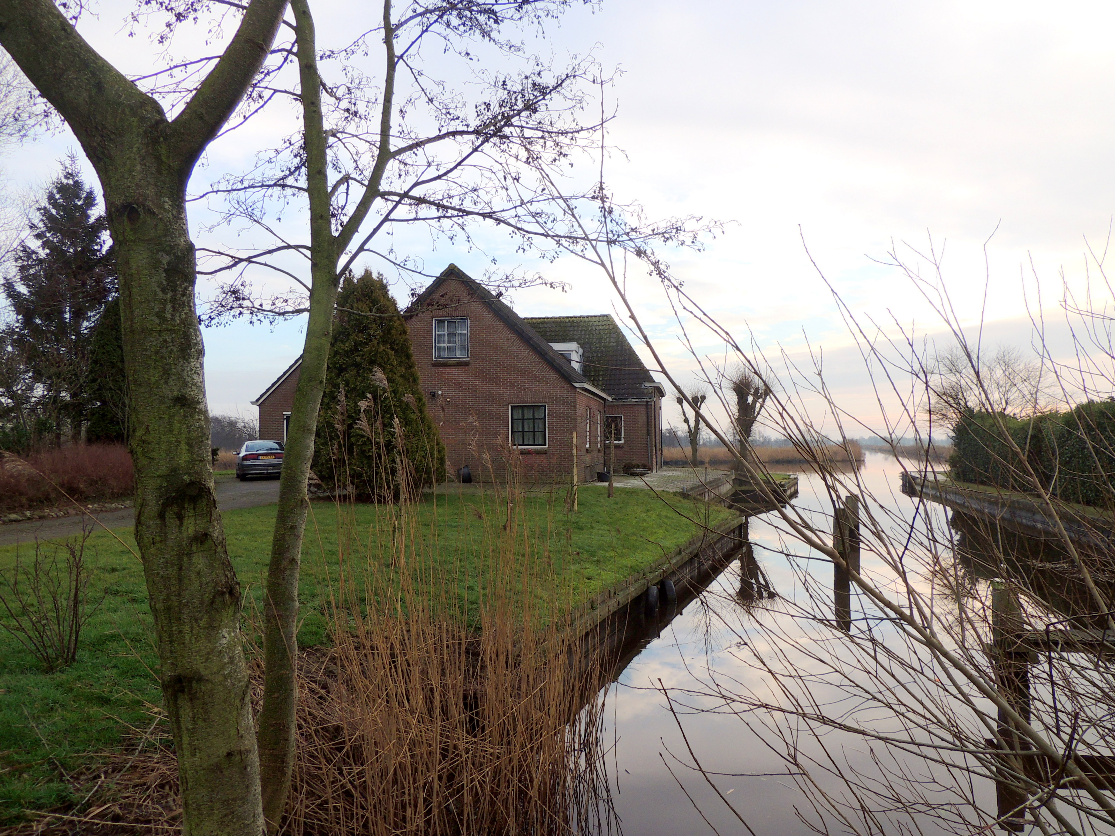 Rohel. Wonen aan het P.M.Kanaal.Vroeger woonde hier de Fam v.d. Meulen